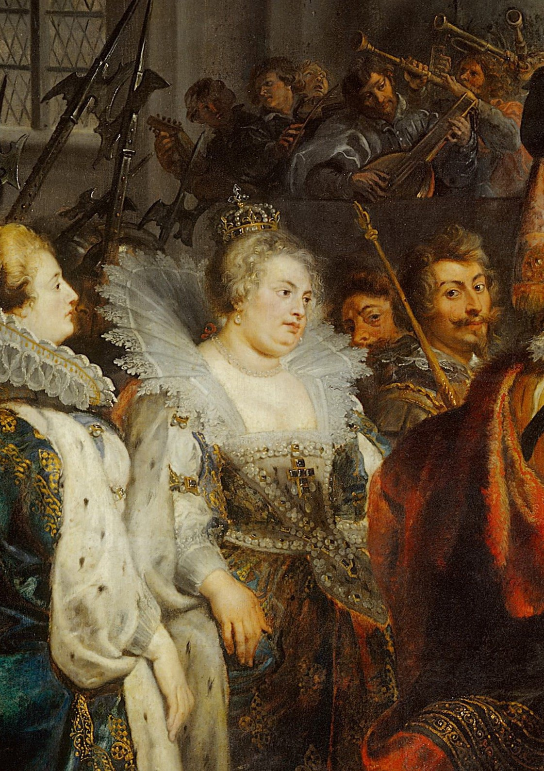 Particolare del dipinto "L'incoronazione della regina all'abbazia di Saint-Denis", del "Ciclo di Maria de' Medici" di Pieter Paul Rubens, raffigurante la Regina Margherita di Valois, prima moglie di Enrico IV di Francia.